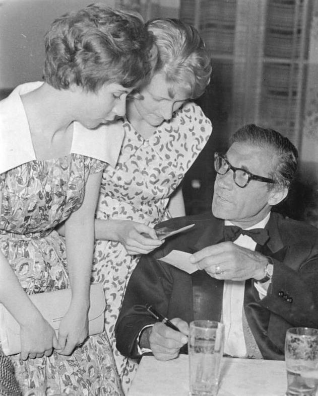 Zentralbild-Gahlbeck 13.6.1960 2. Arbeiterfestspiele des FDGB Filmforum und Filmball zu den Arbeiterfestspielen in Aue. Das Filmforum und der Filmball hatte am 11.6.1960 viele Hundert in das Wismut-Kulturhaus in Aue gelockt. Zahlreiche prominente DEFA-Künstler waren erschienen, unter ihnen Professor Wilkening, Leiter des DEFA-Spielfilmstudios, Raimund Schelcher, Erich Franz, Hans Lucke, Dieter Perlwitz, Willi Schrade und Erich Veldre sowie Harry Hindemith, Rolf Ludwig und Marianne Wünscher. Stürmisch begrüßt wurde der berühmte sowjetische Regisseur Sergei Jutkewitsch. UBz: Raimund Schelcher verteilt Autogramme.